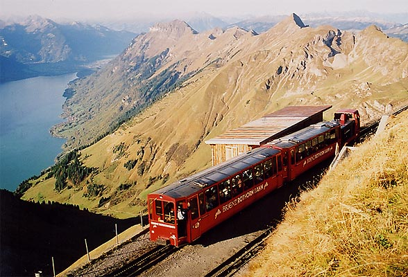 Bergstation der Brienz-Rothorn-Bahn